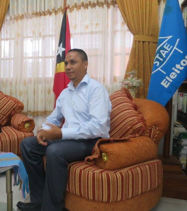 Acilino Manuel Branco, Direktor der STAE